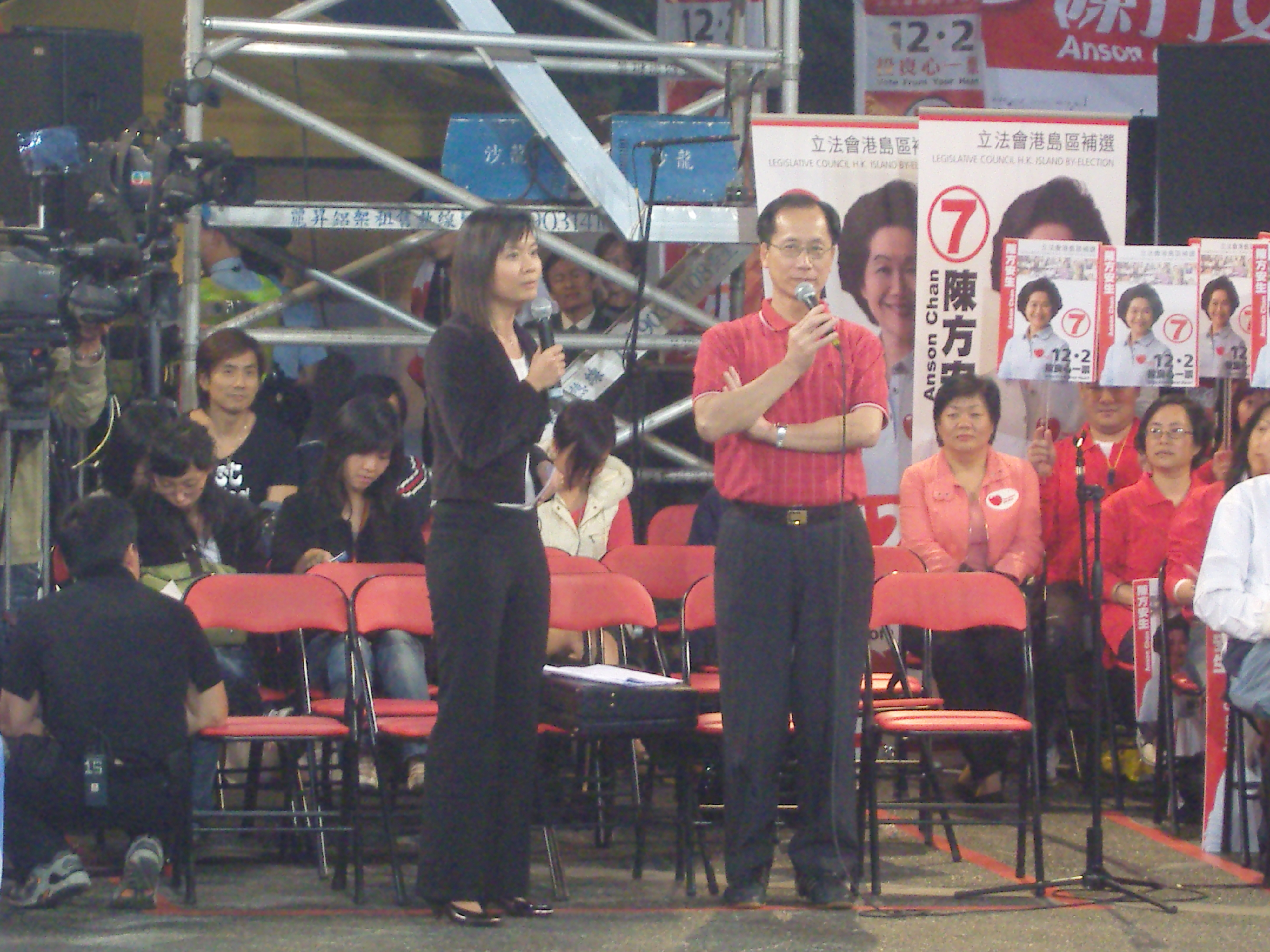 香港立法會港島區補選八大傳媒選舉論壇。